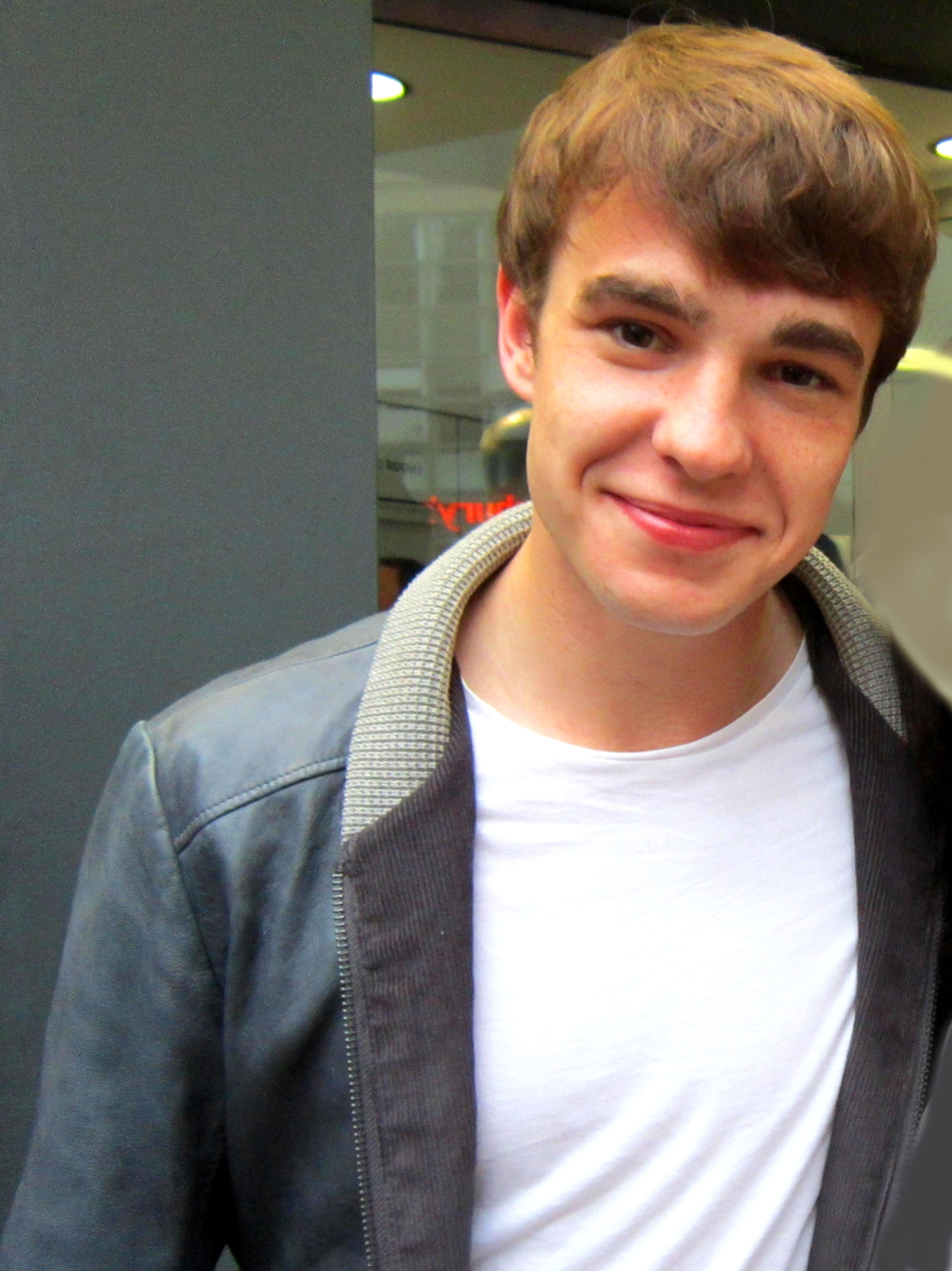 Première Spike Island - fuori dalla Cornerhouse di Manchester